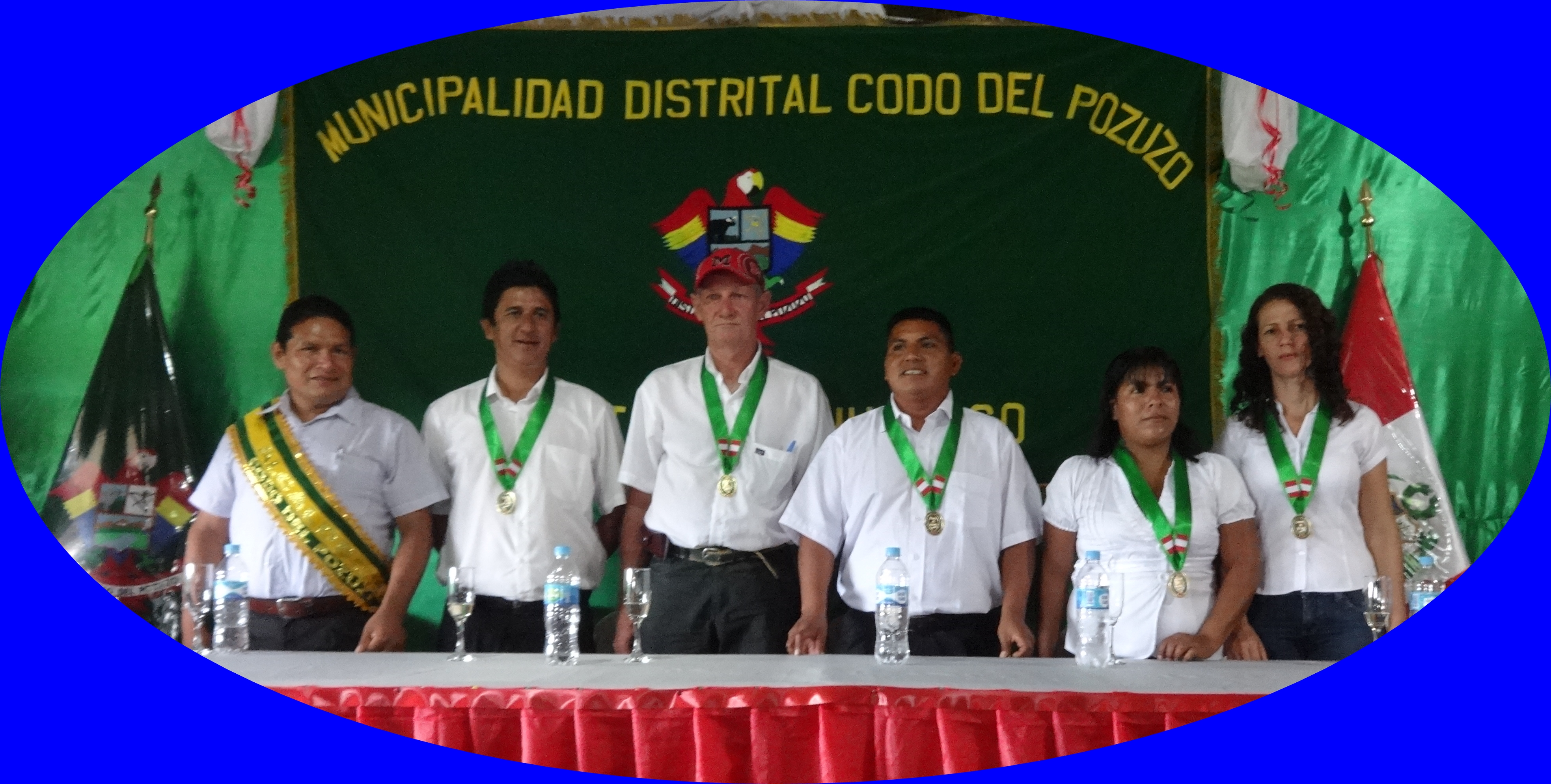 PLENA DE REGIDORES